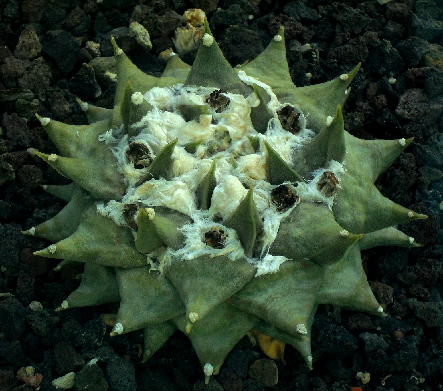 Ariocarpus trigonus - Botanischer Garten Leipzig